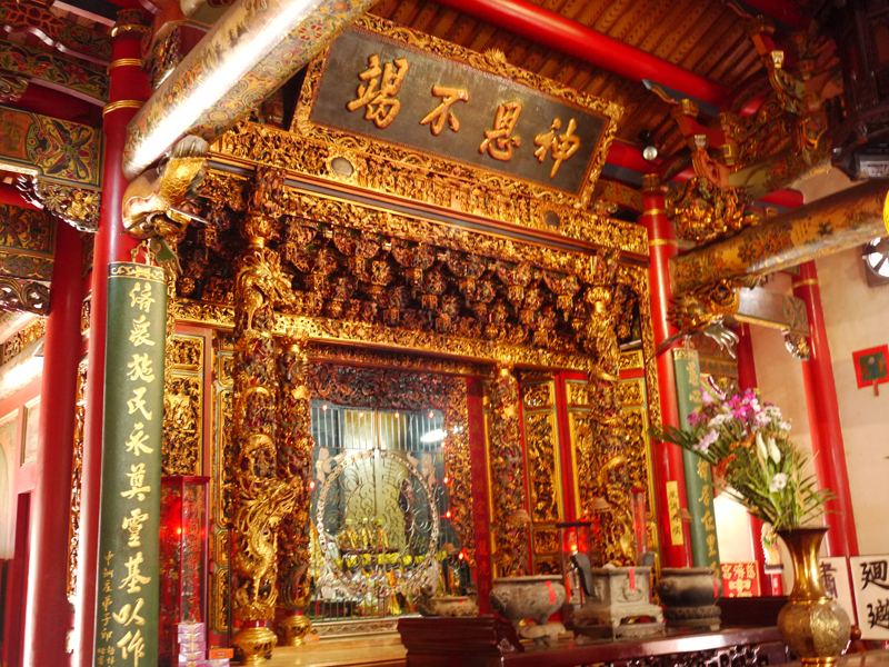 學甲慈濟宮-神恩不竭 匾額Bân-lâm-gú: Ha̍k-kah Tsû-tsè-kong Sîn-un Put Kia̍t pián-hia̍h.